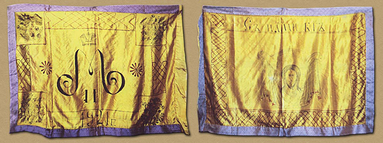 Монгол: Азийн морин дивизийн туг